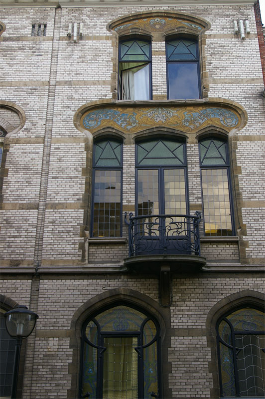 Waterloostraat 26–28, Zurenborg area of Antwerp